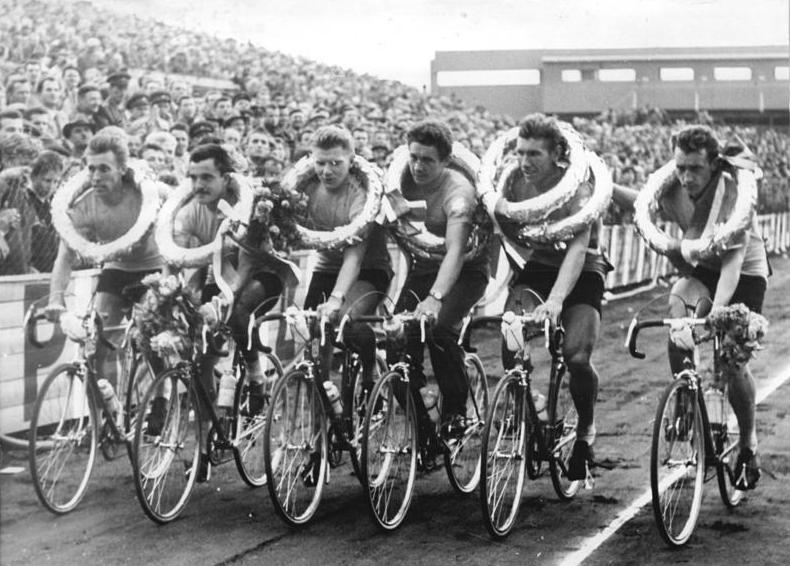 Friedensfahrt, Mannschaft der UdSSR Zentralbild Wendorf 17.5.1961 XIV. Internationale Friedensfahrt Warschau-Berlin-Prag 1961. 13. und letzte Etappe von BRNO nach Prag am 16.5.61. Die XIV. Internationale Friedenfahrt klang am 16.5.1961 in Prag mit einem Triumph der sowjetischen Fahrer aus. Sie belegten nicht nur durch Juri Melichow und Olympiasieger Viktor Kaptonow die ersten beiden Plätze in der Einzelwertung, sondern feierten auch im Mannschaftsklassement einen überlegenen Sie vor der DDR und Rumänien. UBz: Die siegreiche sowjetische Mannschaft während der Siegerehrung. Großer Beifall brauste im Stadion auf, als sich die sechs Fahrer auf die Ehrenrunde begaben. V.r.n.l.: Moskwin, Tscherepowitsch, Melichow, Petrow, Saidchushin und Kapitonow.